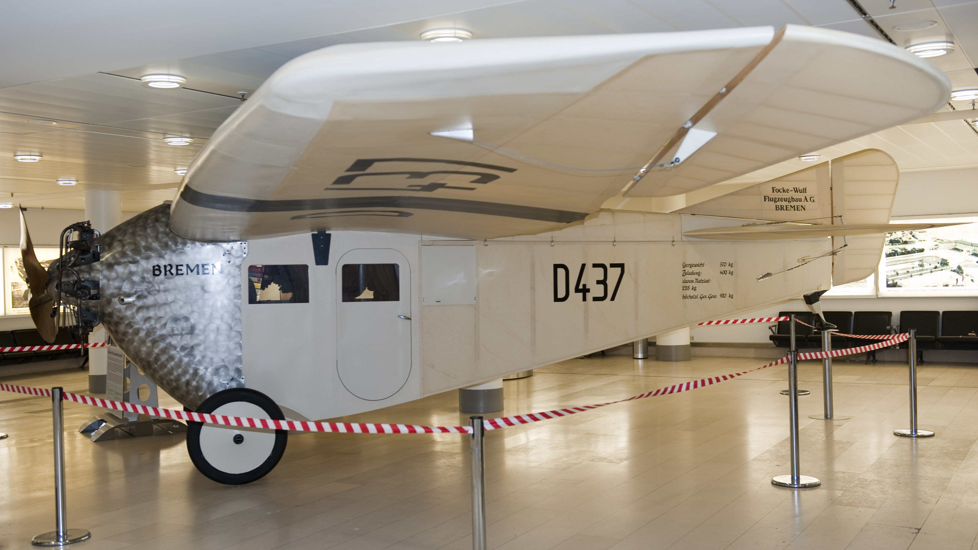 Focke Wulf A16, erstes Bremer Verkehrsflugzeug. Ende 1923 wurde in Bremen die Focke-Wulf Flugzeugbau A.G. gegründet. Geschäftsführer waren die Freunde Henrich Focke und Georg Wulf, die sich schon vor dem Ersten Weltkrieg mit der Entwicklung von Flugzeugen beschäftigt hatten. Den ersten Auftrag über den Bau von drei Kleinflugzeugen vom Typ A 16 erhielt die Firma von der Bremer Luftverkehrsgesellschaft, die auch Teilhaber des Unternehmens war. 21 Flugzeuge wurden von 1924 bis 1927 gebaut. Mit einer Reichweite von rund 500 Kilometern und einer Reisegeschwindigkeit von 130 km/h flog die A 16 unter anderem im Bäderdienst zwischen Bremen und den Ostfriesischen Inseln. 1936 wurden die letzten Maschinen außer Dienst gestellt. Die A 16 war der Grundstein für den Erfolg der Firma Focke-Wulf und deren Nachfolger EADS Airbus Bremen. Da keines der Originalflugzeuge die Zeiten überdauert hat, entschloss sich Airbus 1988 im Rahmen der Traditionspflege eine zweiundzwanzigste Maschine zu bauen. Mit großem persönlichem Einsatz fertigten Techniker, Auszubildende und ehemalige Mitarbeiter innerhalb von acht Monaten einen nicht flugfähigen Nachbau an. Nachdem die Maschine 20 Jahre im Hamburger Airbuswerk ausgestellt war, wurde sie 2008 dem Technikmuseum Berlin als Schenkung überlassen.